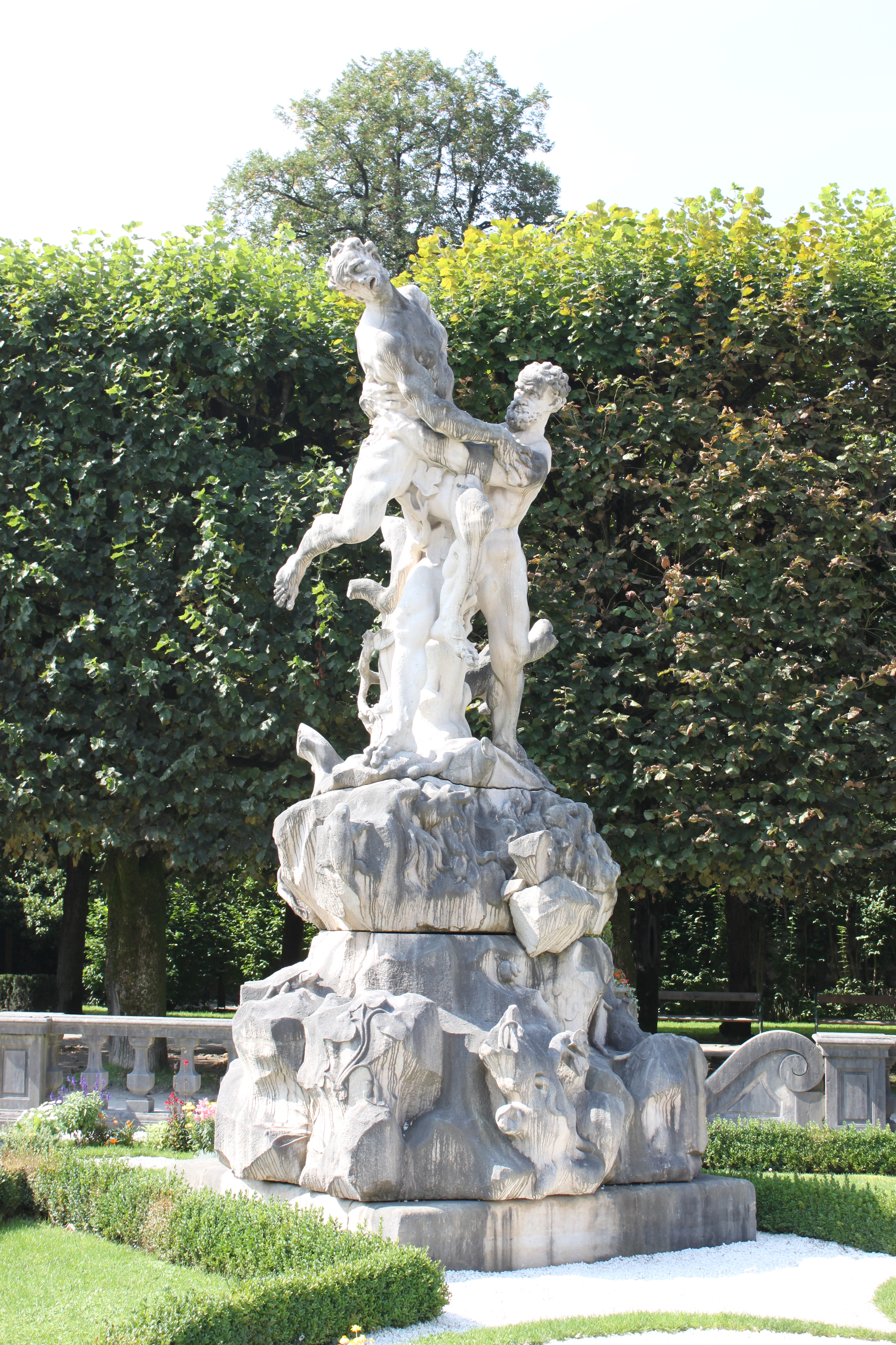 Anlage Schloss Mirabell samt Gärten, Herakles erwürgt Antaios im Mirabellgarten, als Teil des Vier-Elemente-Brunnens, Antaios verliert in der Luft seine Kraft, für das Element Luft